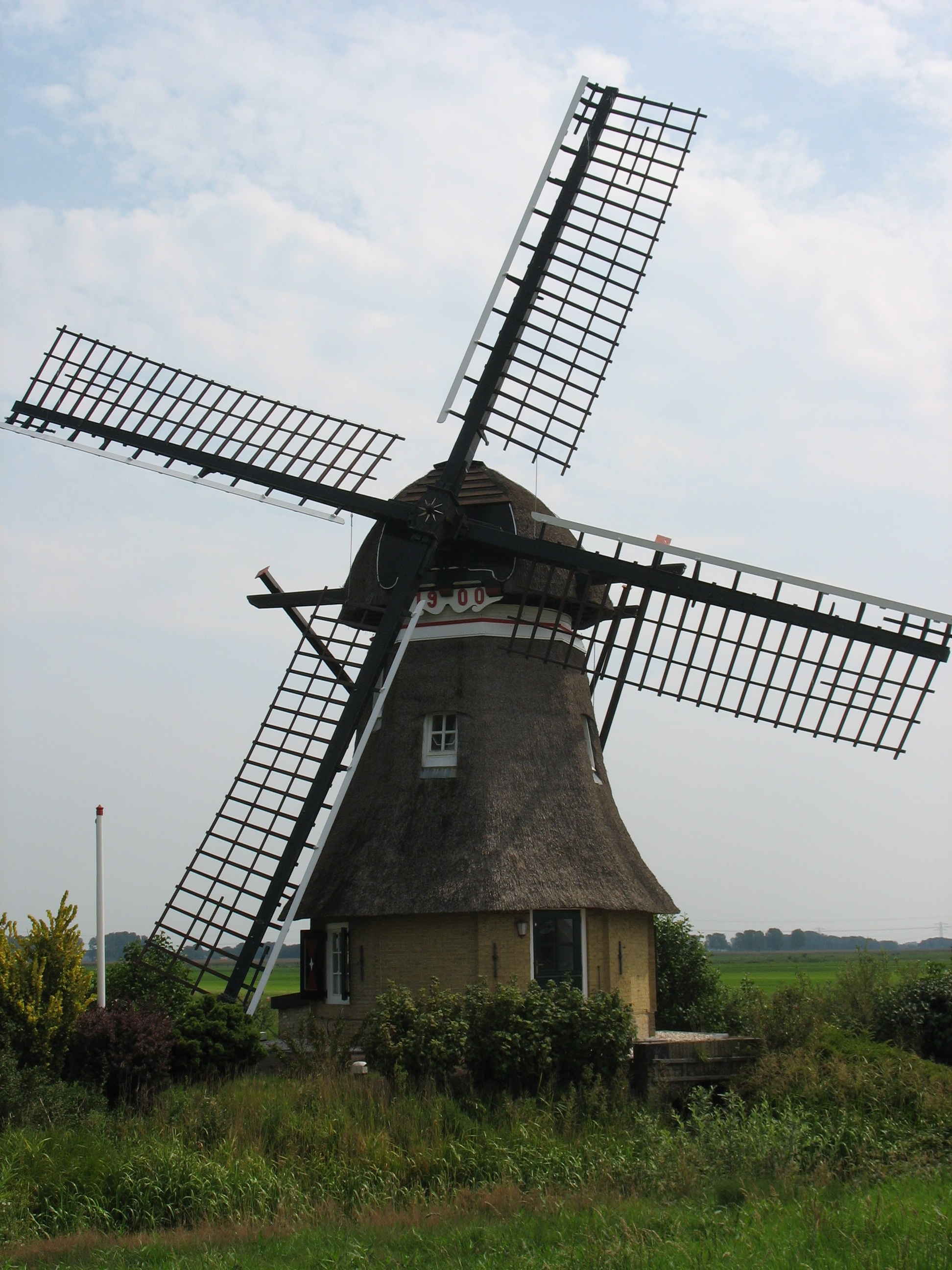 Poldermolen de Swarte Prinsch